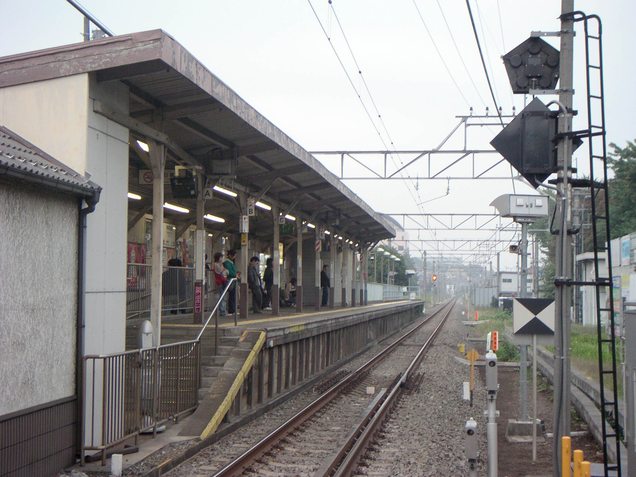 Omekaido Station, Tokyo, Japan